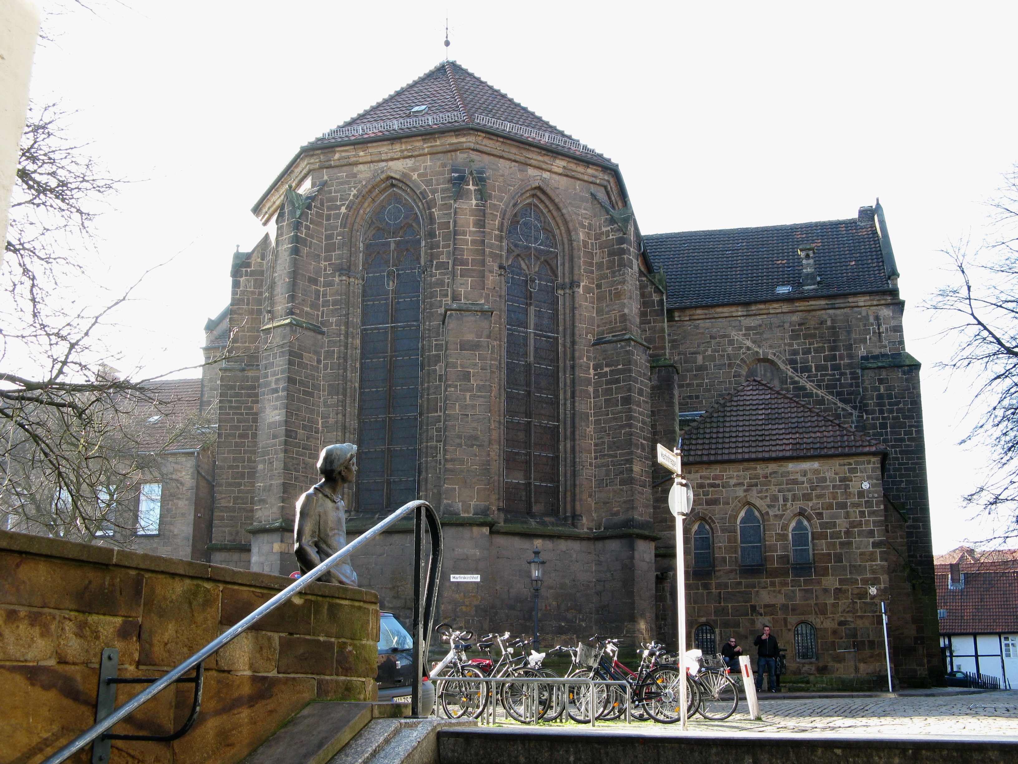 Die Martinikirche (St. Martini) in Minden, Nordrhein-Westfalen. Die Kirche wurde stammt aus dem 11. Jahrhundert. Ansicht von Osten her. Links war die ehemalige Töchterschule. Am Treppenaufgang der sogenannte Mindener Buttjer, eine Skulptur aus Bronze, vgl. Buttjersprache.